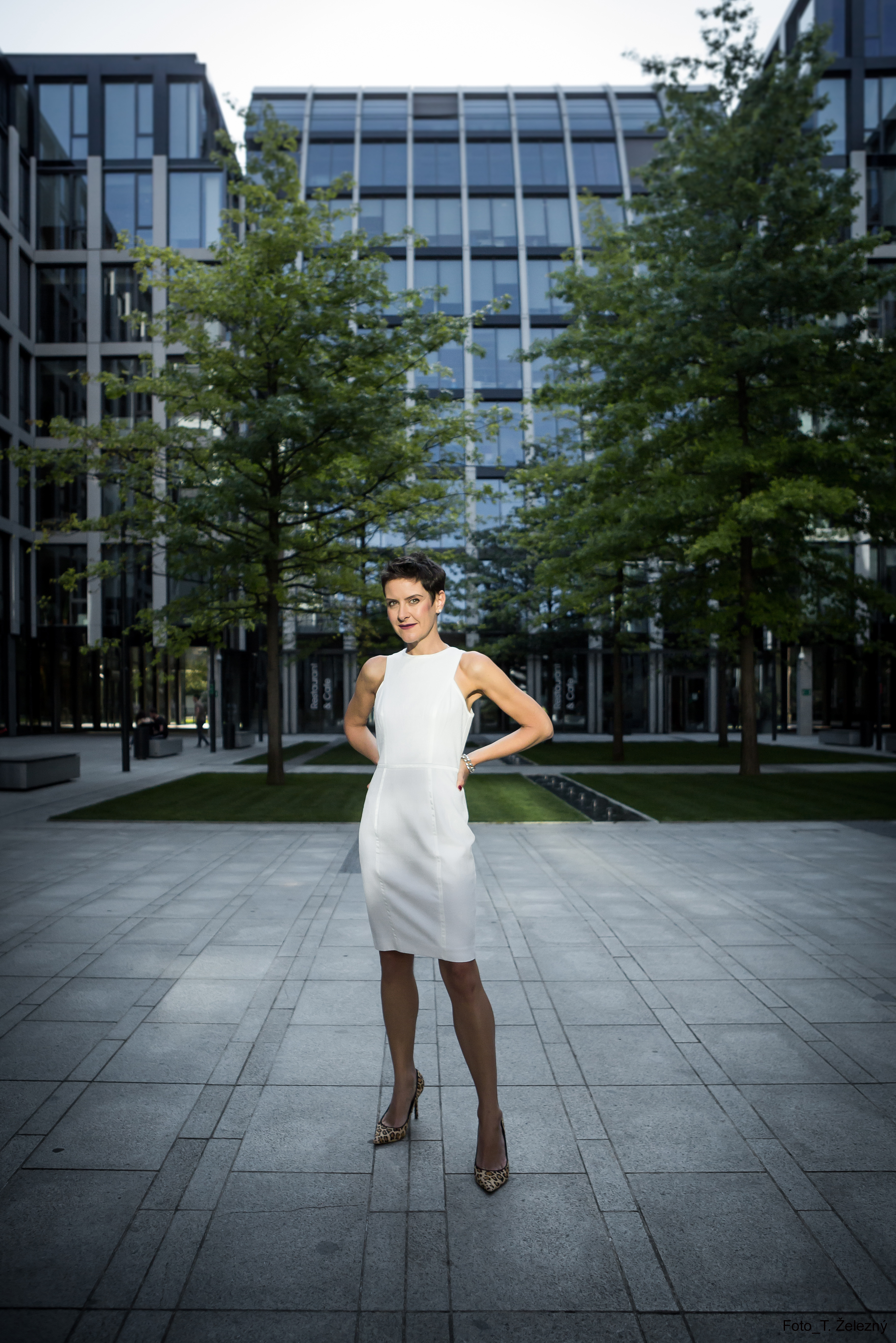 Eva Le Peutrec Architect